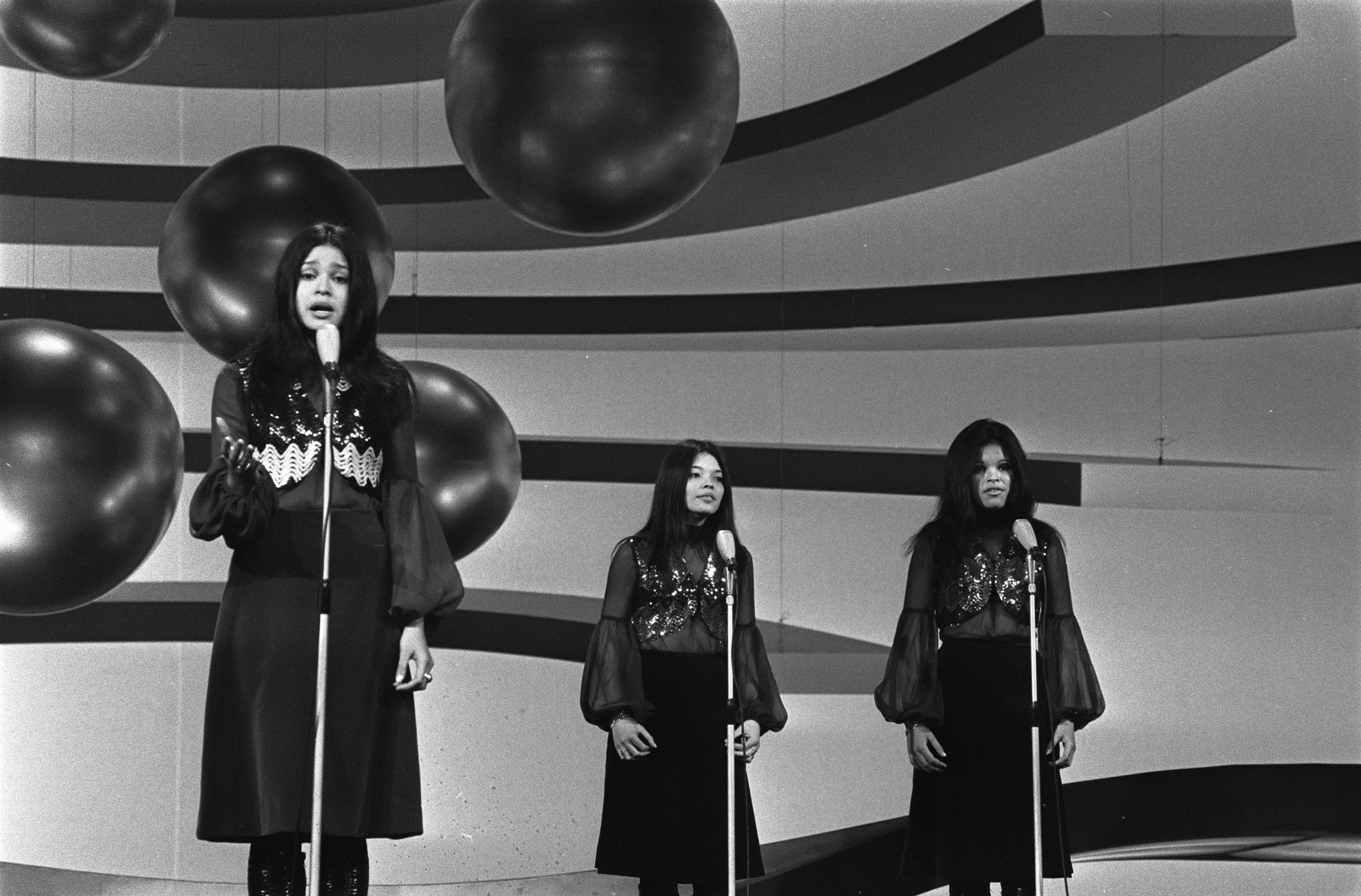 Collectie / Archief : Fotocollectie Anefo Reportage / Serie : Eurovisie Songfestival 1970 in RAI te Amsterdam Beschrijving : The Hearts of Soul (Nederland) Datum : 21 maart 1970 Locatie : Amsterdam, Noord-Holland Trefwoorden : artiesten, songfestivals, zangers Instellingsnaam : Eurovisie Song Festival Fotograaf : Koch, Eric / Anefo Auteursrechthebbende : Nationaal Archief Materiaalsoort : Negatief (zwart/wit) Nummer archiefinventaris : bekijk toegang 2.24.01.05 Bestanddeelnummer : 923-3705